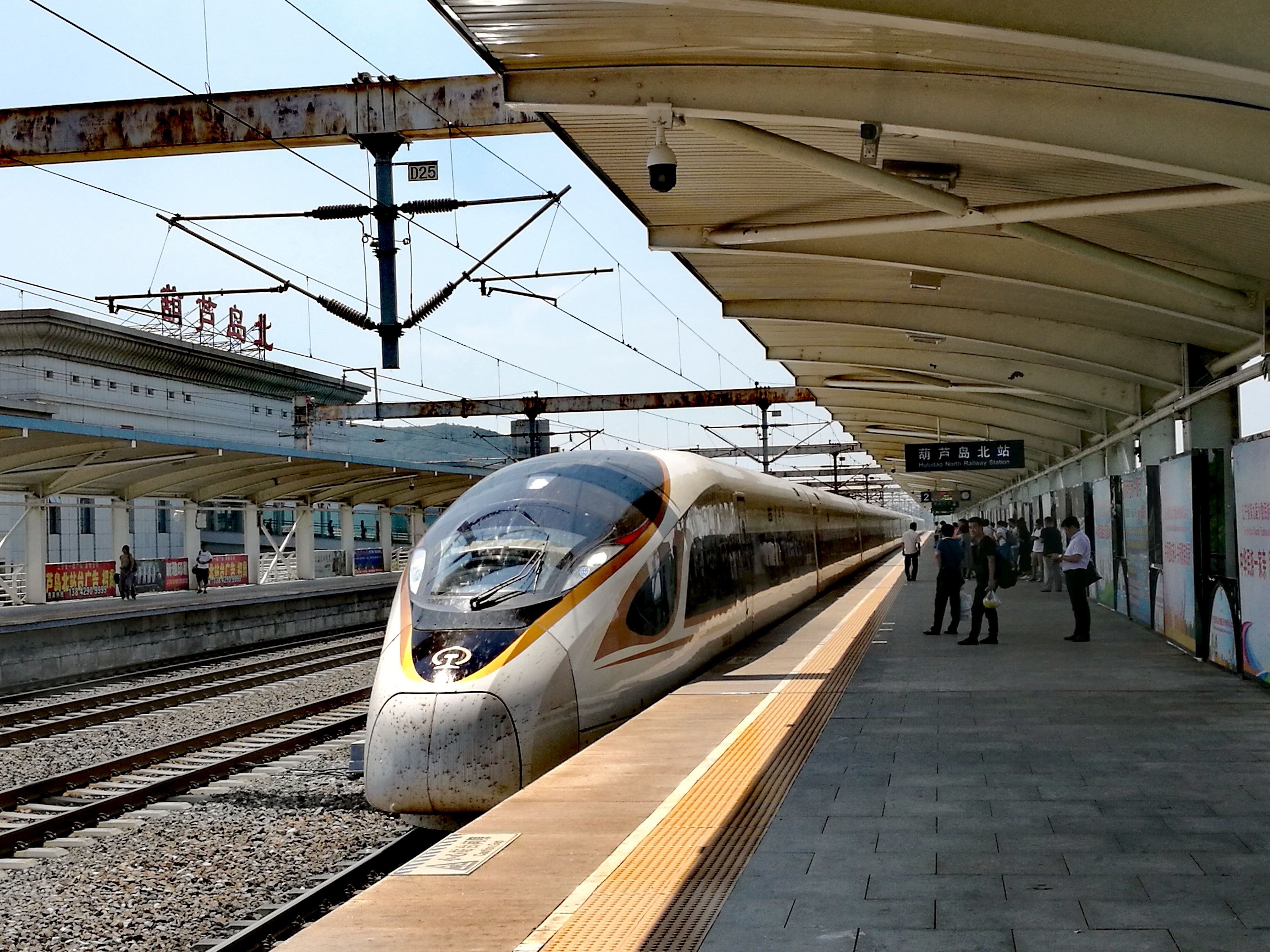 CR400BF 动车组列车在葫芦岛北站